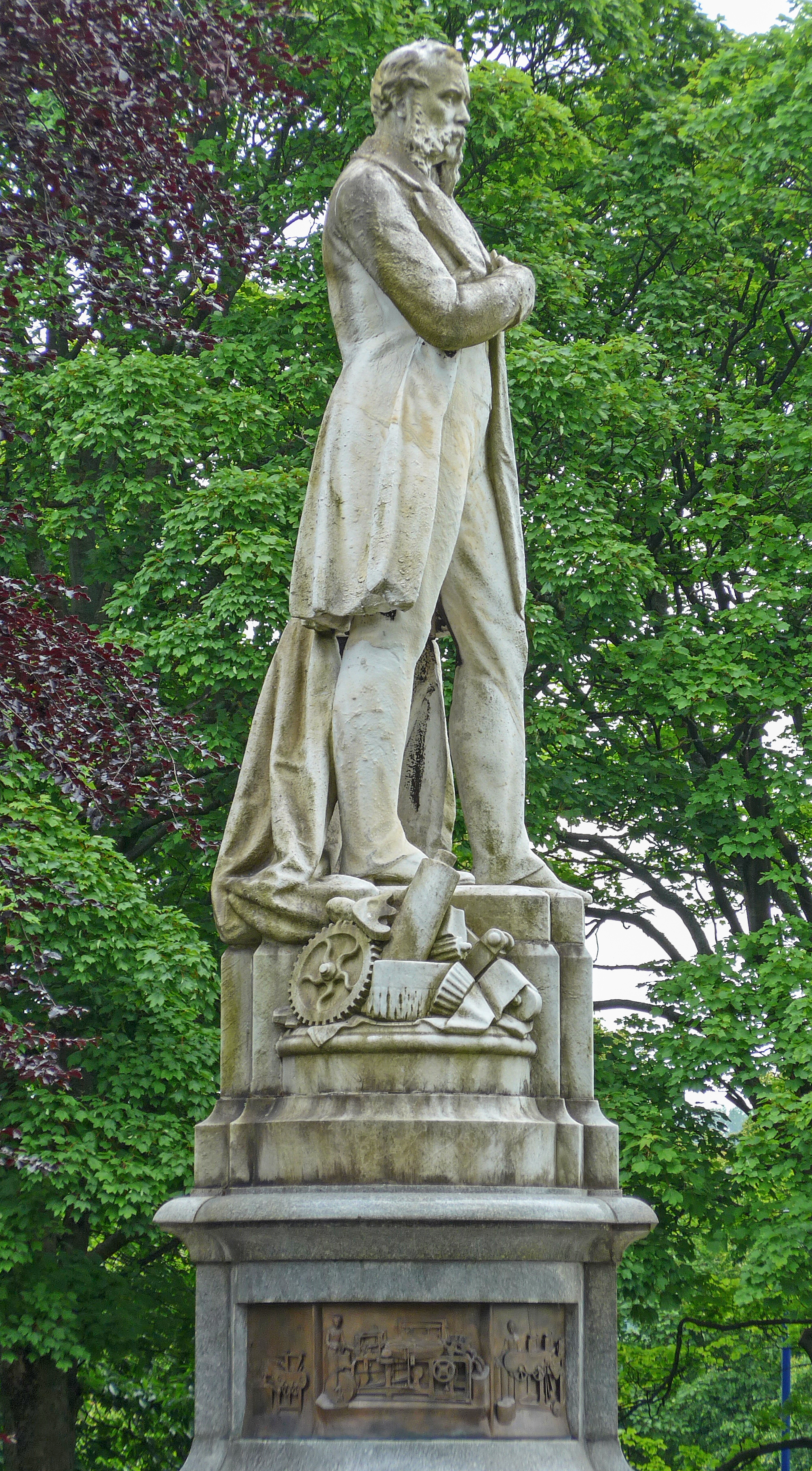 Lister Park - Statue of Samuel Lister